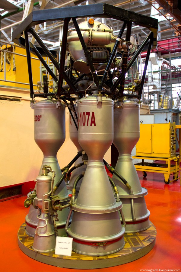 Ракетный двигатель РД-107А АО "Кузнецов", Самара, Россия